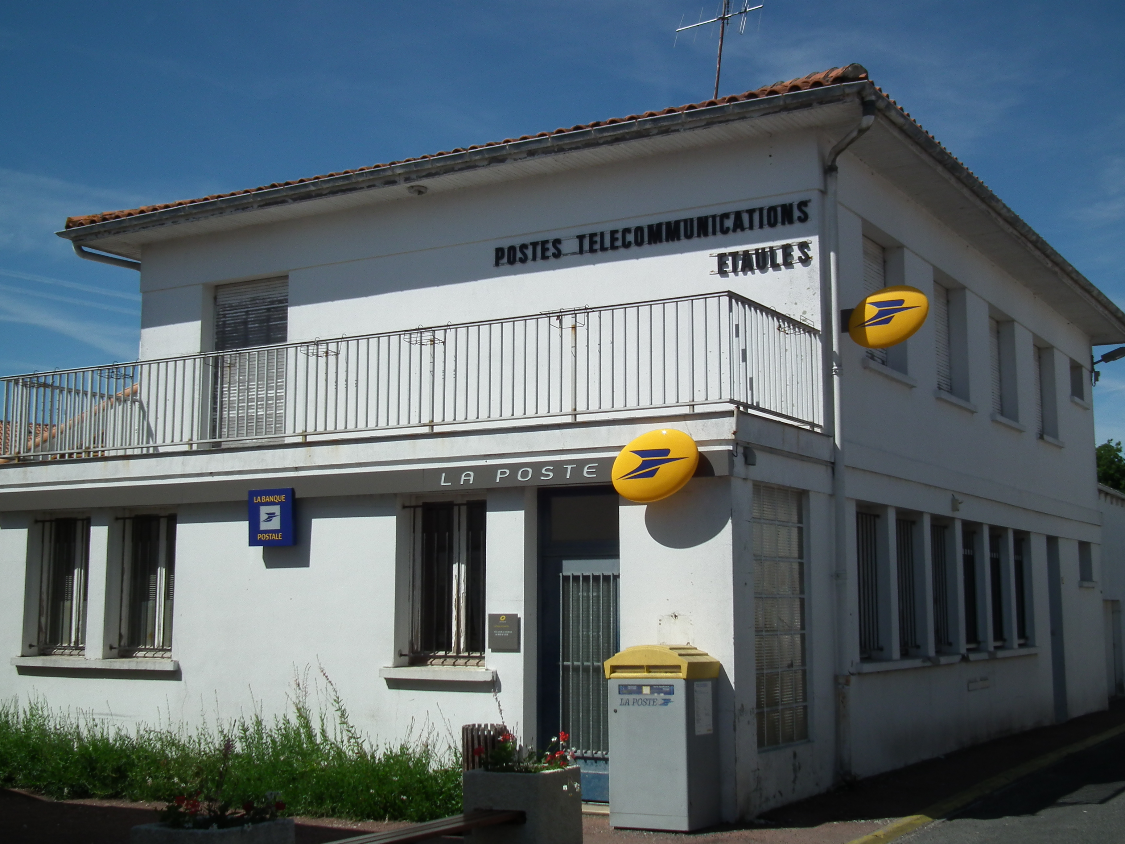 Poste d'Etaules